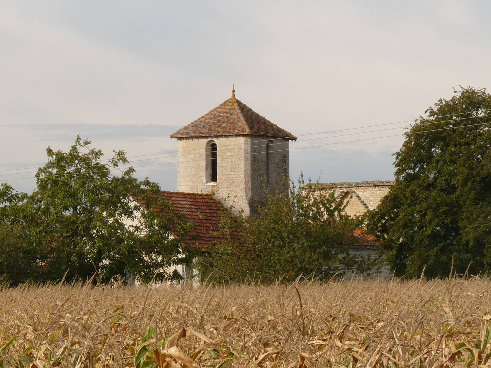 église de Moutonneau, Charente, France